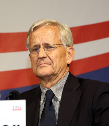 Andreas Unterberger-9446